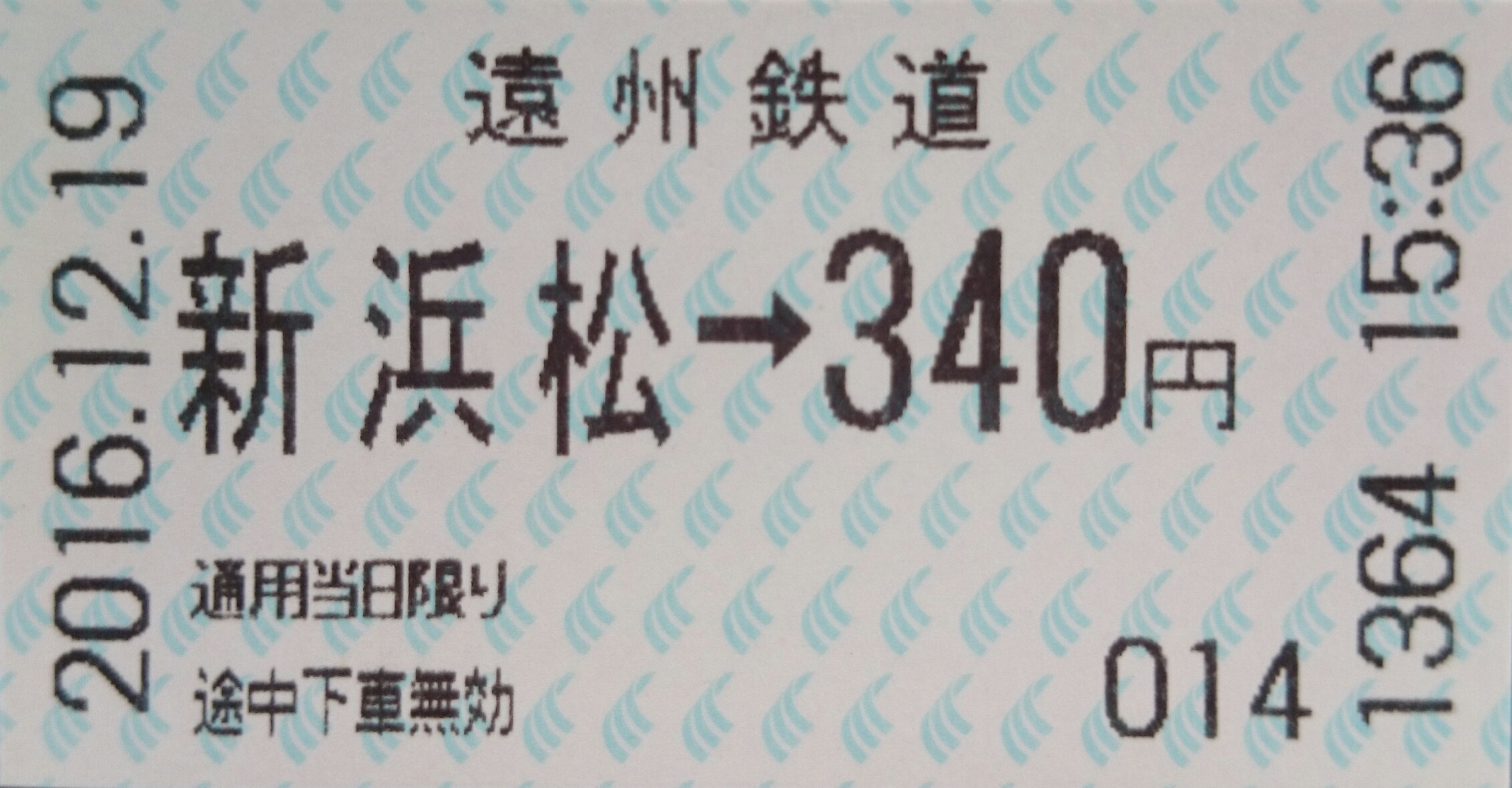 遠州鉄道鉄道線 乗車券（新浜松駅－浜北駅区間）